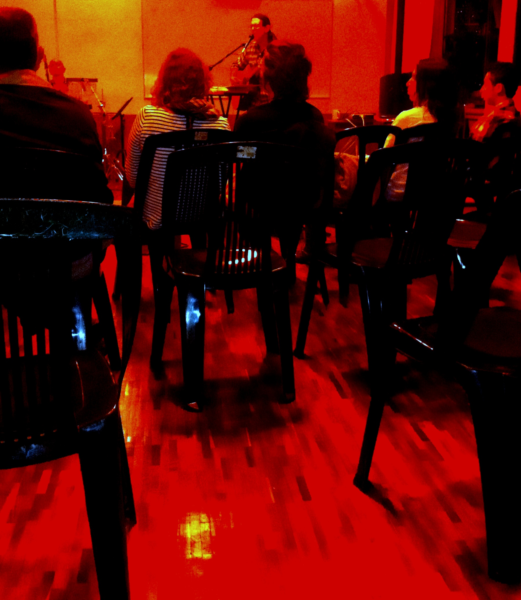 MEMO MÉNDEZ GUIÚ